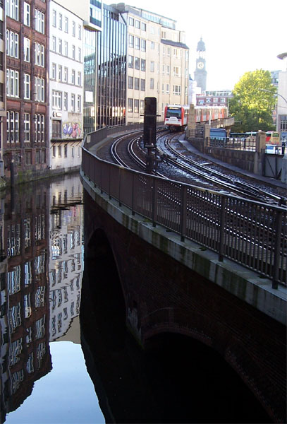 Die U-Bahn am Rödingsmarkt in Hamburg-Altstadt auf dem Weg vom Tunnel auf den Viadukt.